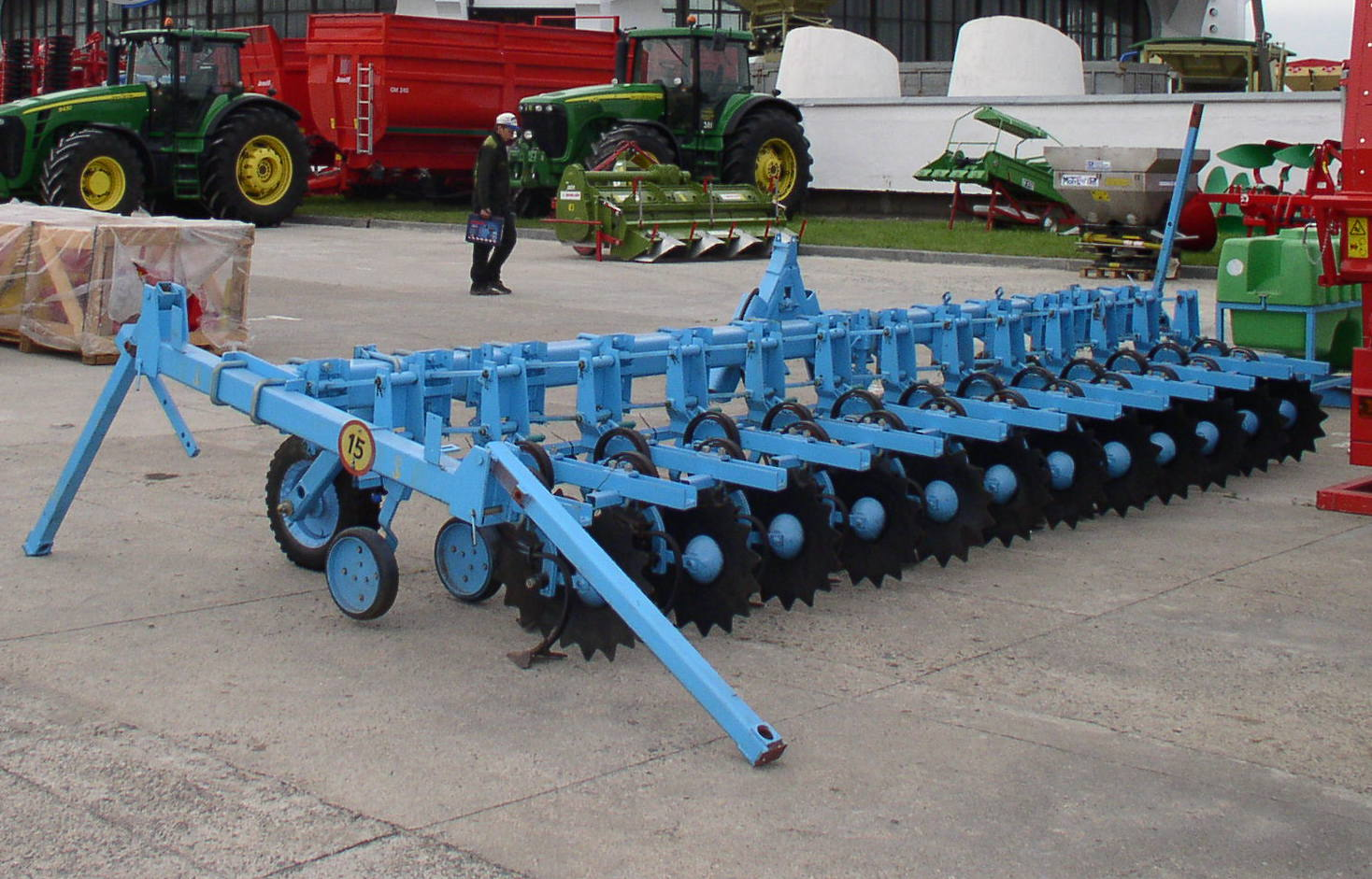 Eine blaue Hackmaschine, Belagro 2007, Minsk